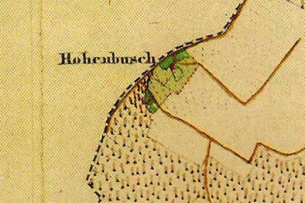 Preußische Kartenaufnahme 1846 -Uraufnahme- (Gangelt)